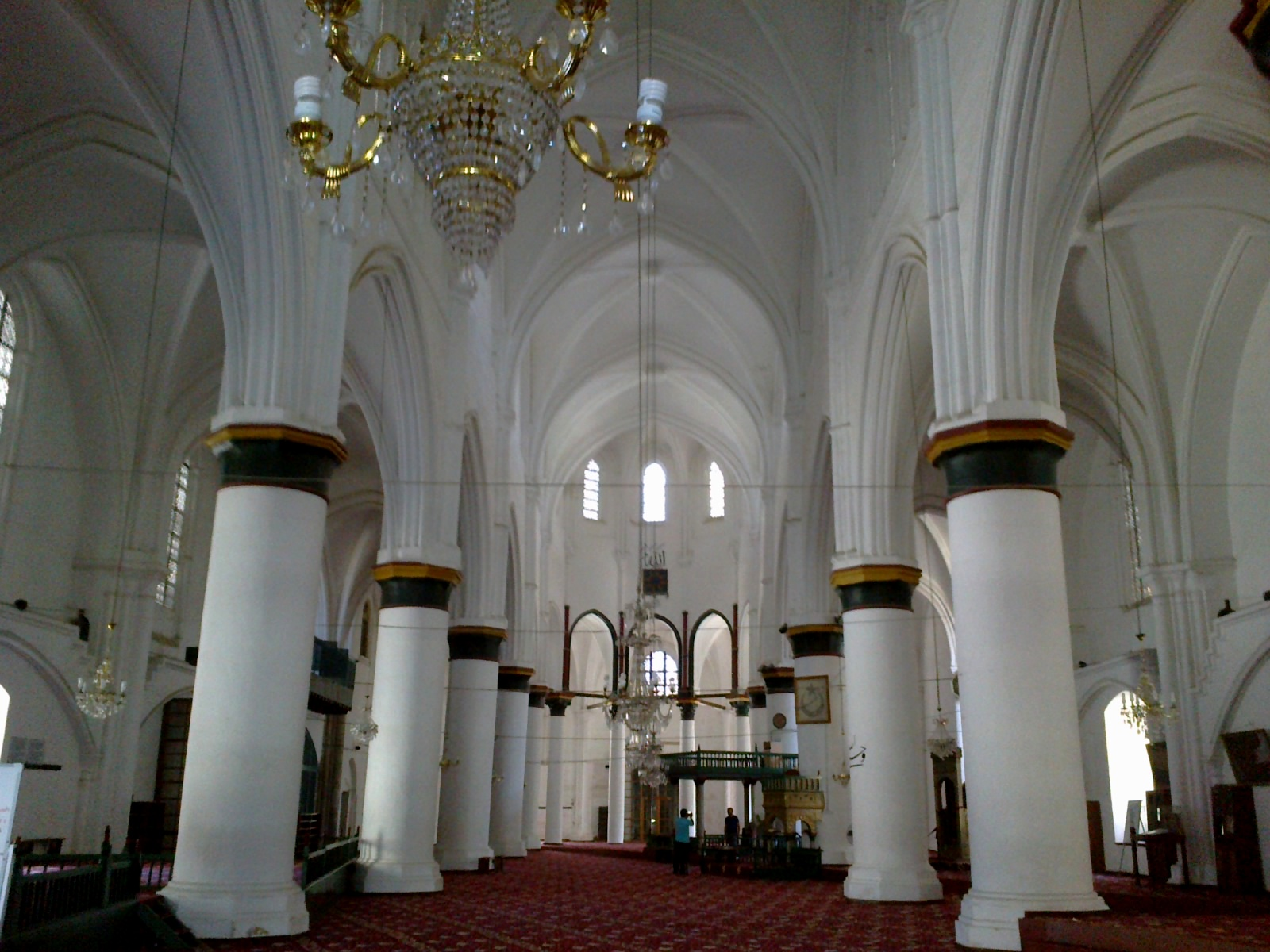 Chypre Nicosie Mosquee Selimiye Nef